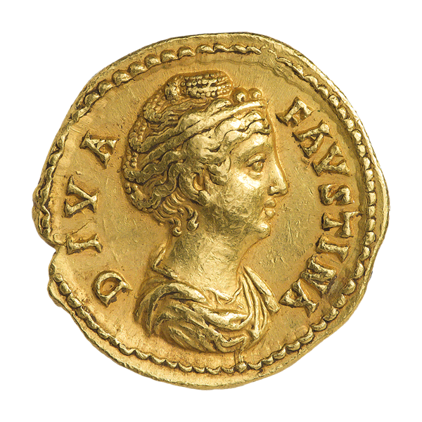 Ауреус. Фаустина Старшая. После 141 г. (аверс). Надпись DIVA FAVSTINA. Бюст Фаустины Старшей, вправо. Посмертная чеканка в правление Антонина Пия